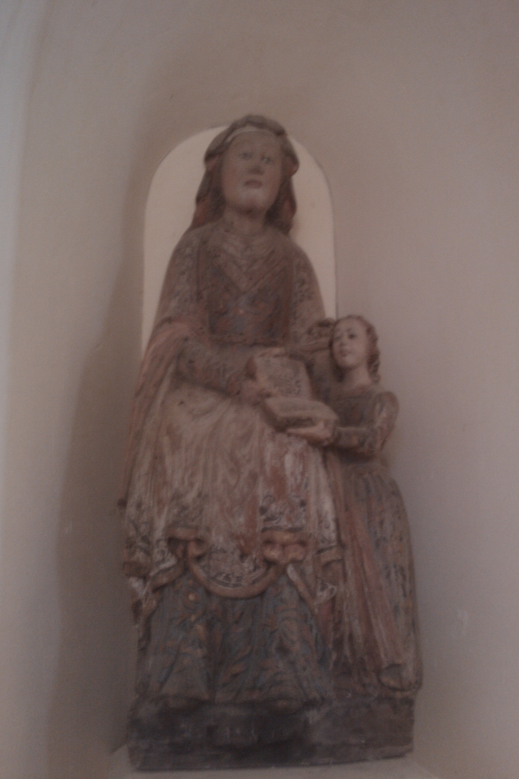 groupe sculpté dans l'Église de La Feuillie, XVIes